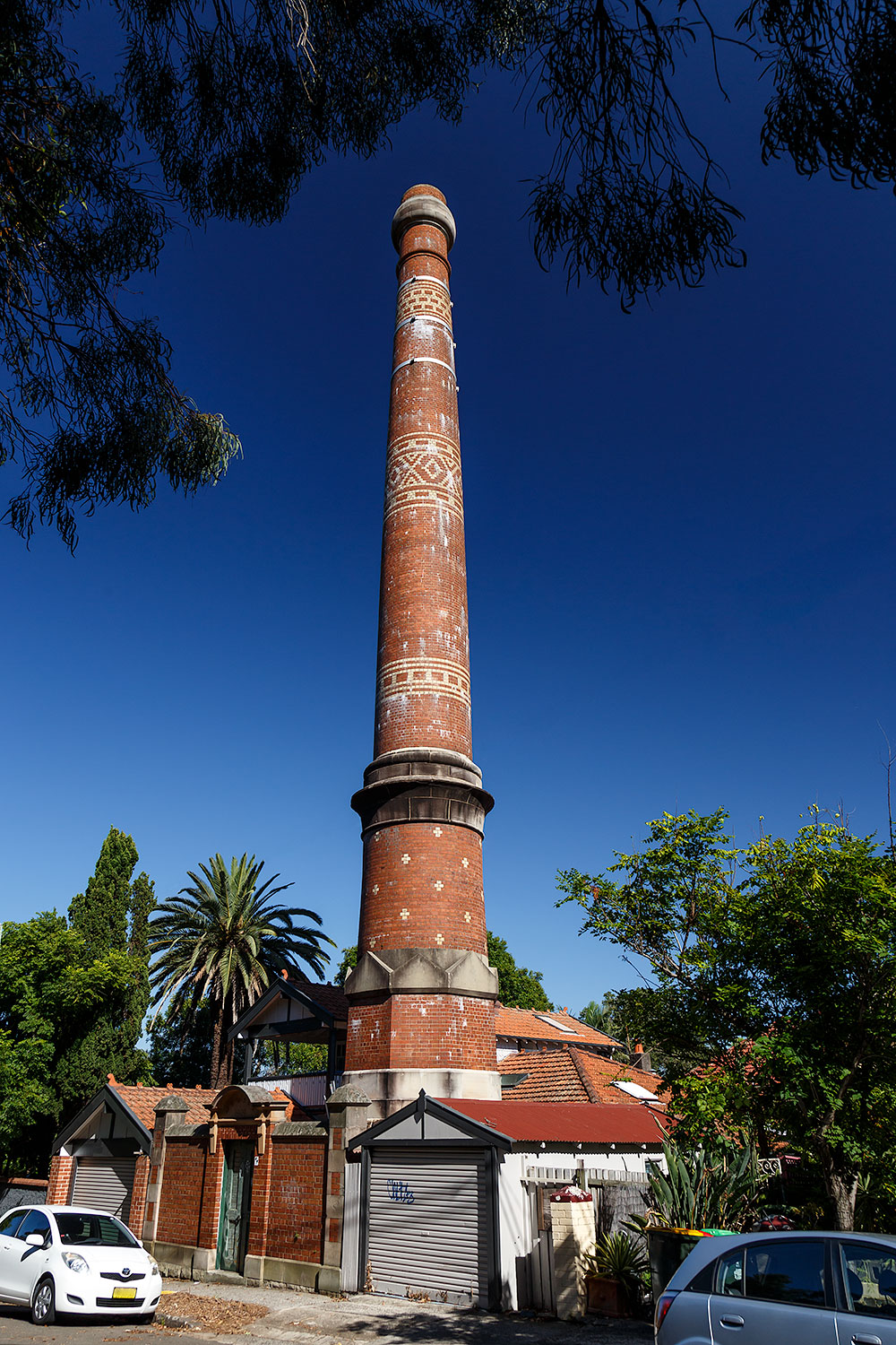 Lewisham Sewer Vent